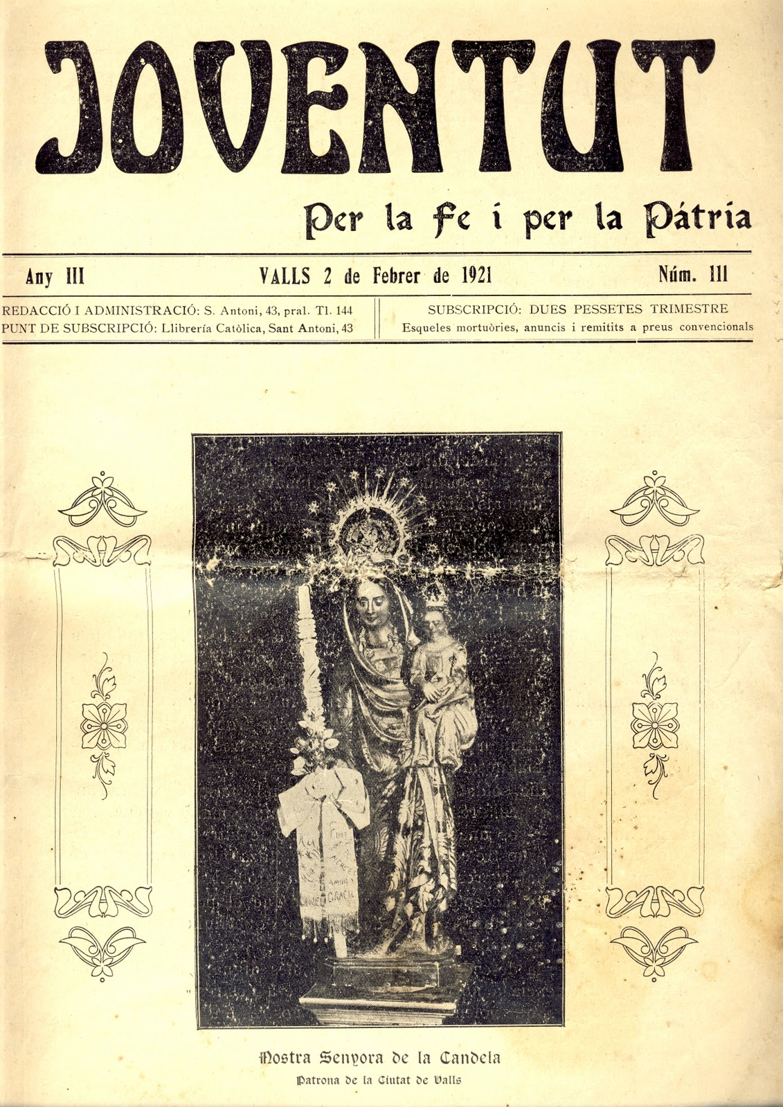 Semanario Joventut per la Fe i per la Pàtria